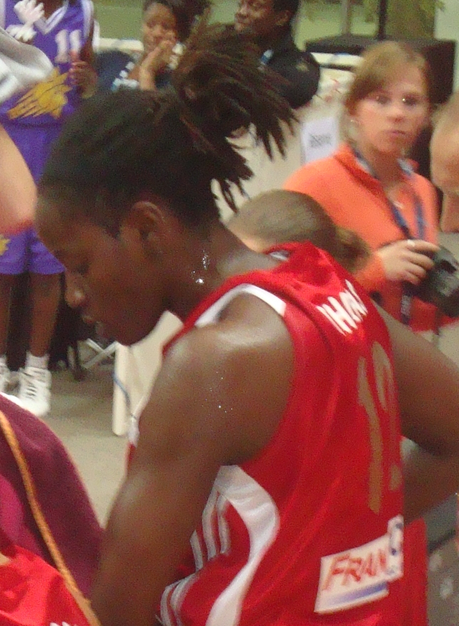 La basketteuse américaine Carla Thomas sous le maillot e Villeneuve d'Ascq lors d'un temps mort pendant l'Open LFB 2011.